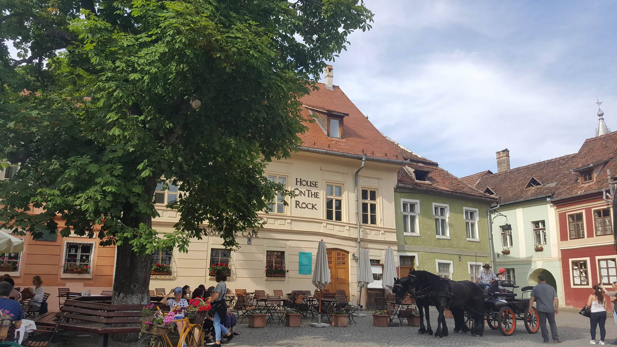 House on the Rock, Piata Cetații, Sighișoara, județul Mureș